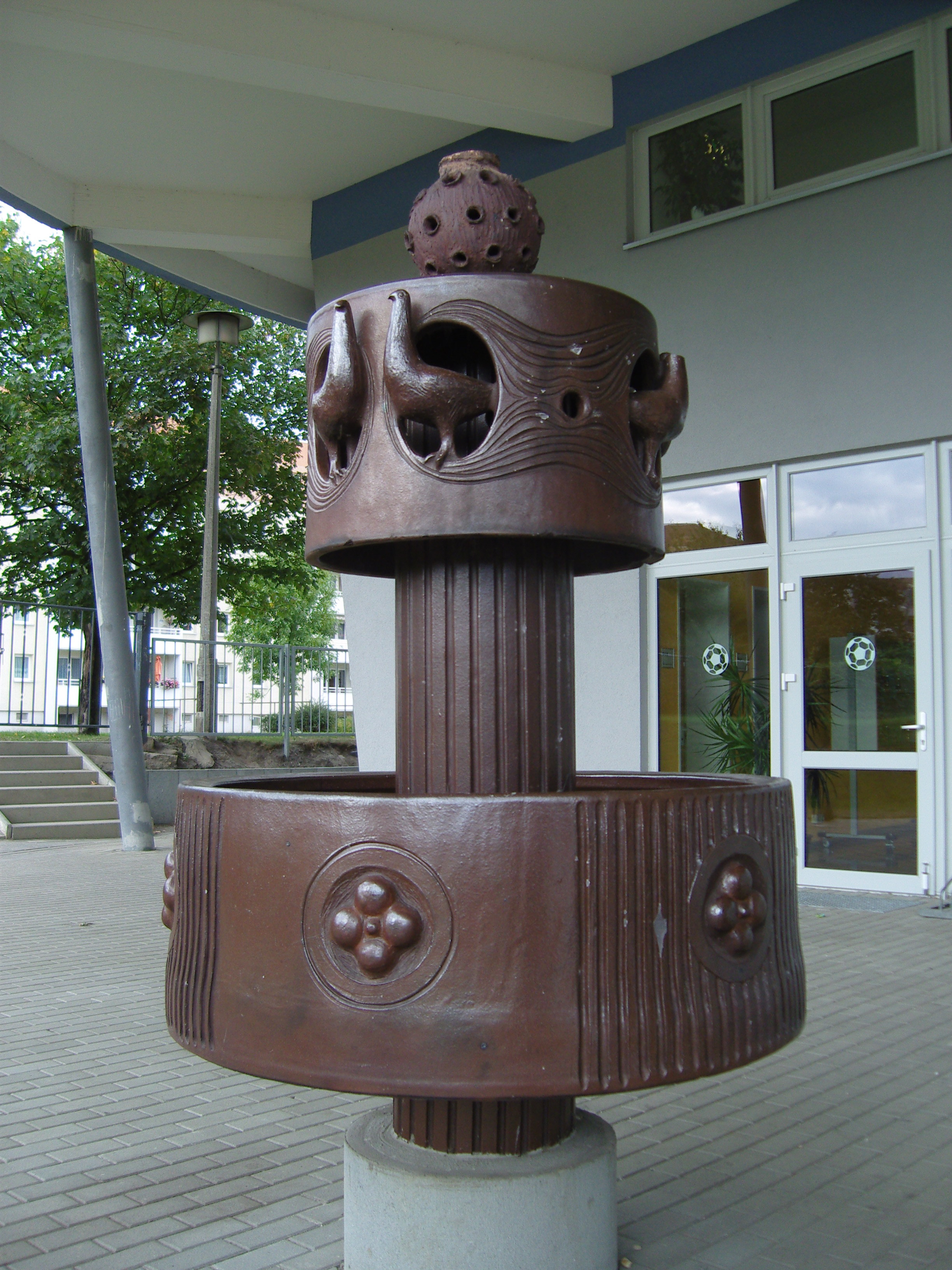 Brunnen von Woyski aufgestellt in Senftenberg Schulhof des Gymnasiums (ehemalige POS VII)